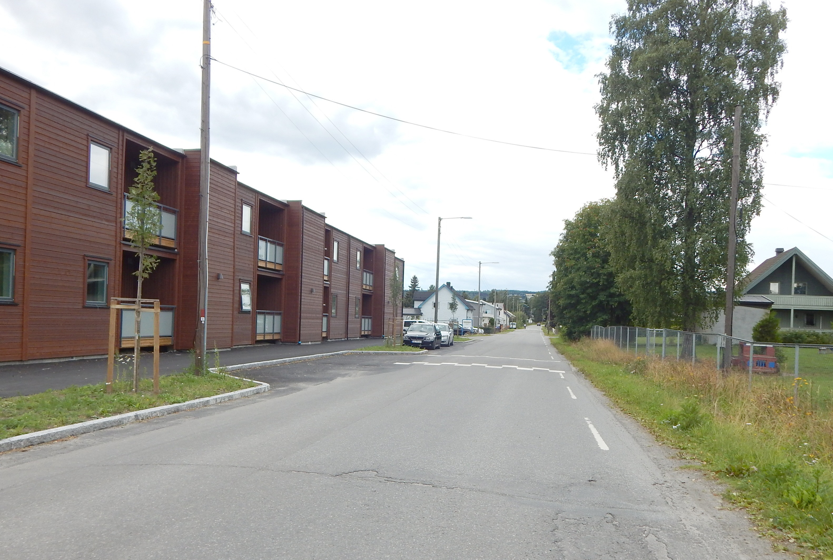 Fagerlundvegen (fylkesvei 1776, tidl. 90) i Brumunddal